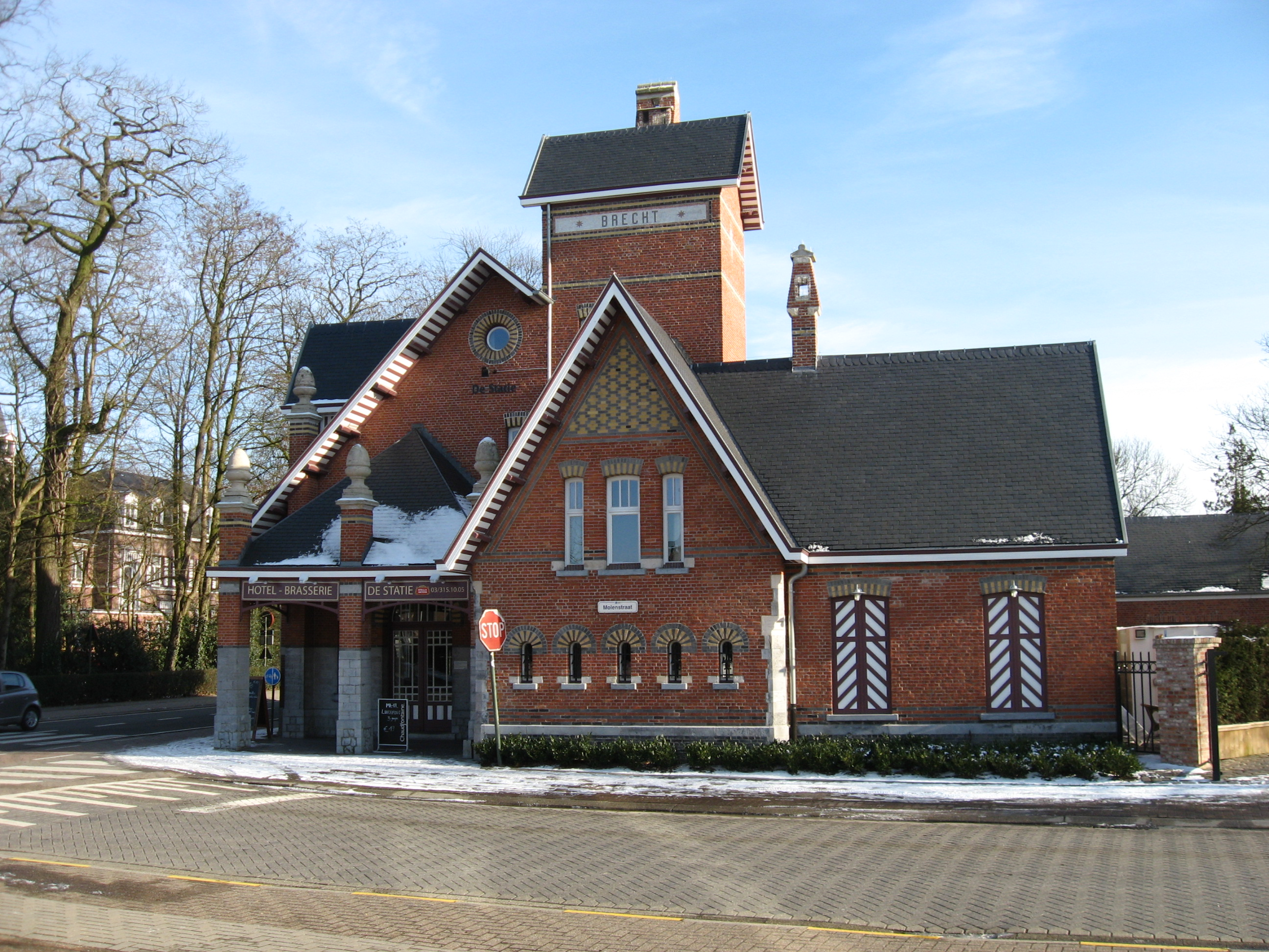 Het voormalig buurtspoorwegstation gebouwd in 1910 in de "art nouveau" stijl.